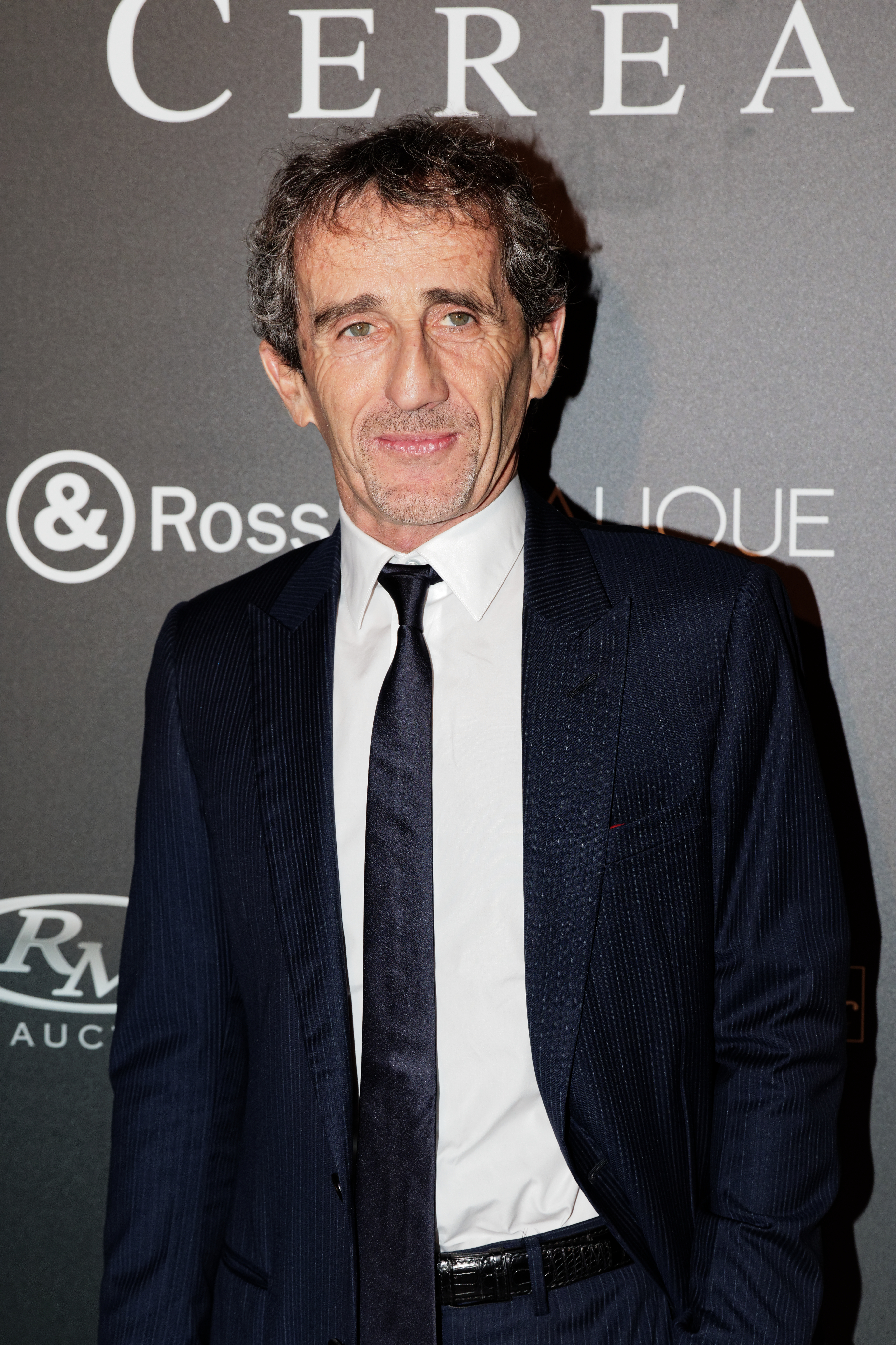 Photocall du festival automobile international 2015.